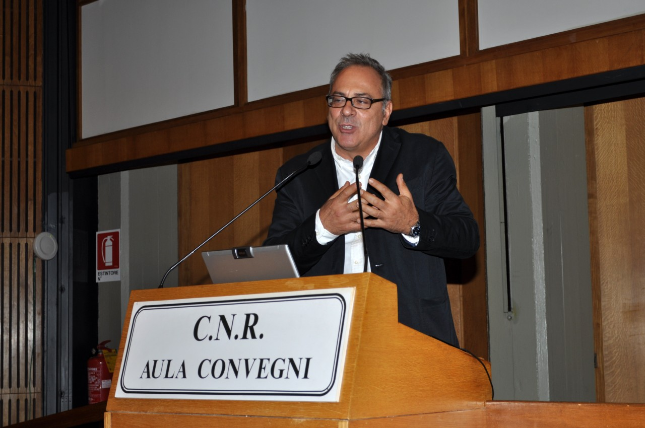 Stefano Vella